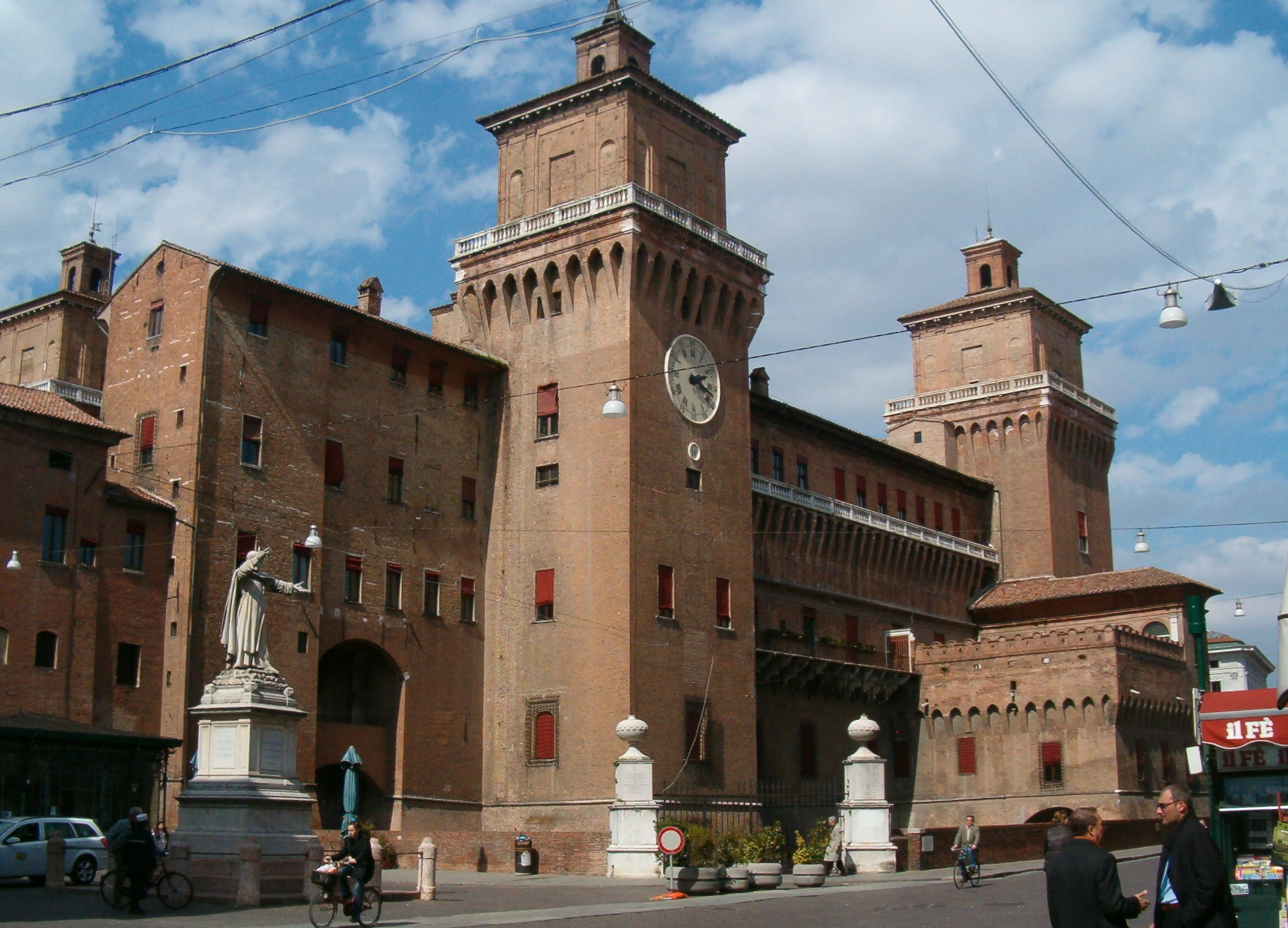 Ferrara, Italy Il Castello Estense